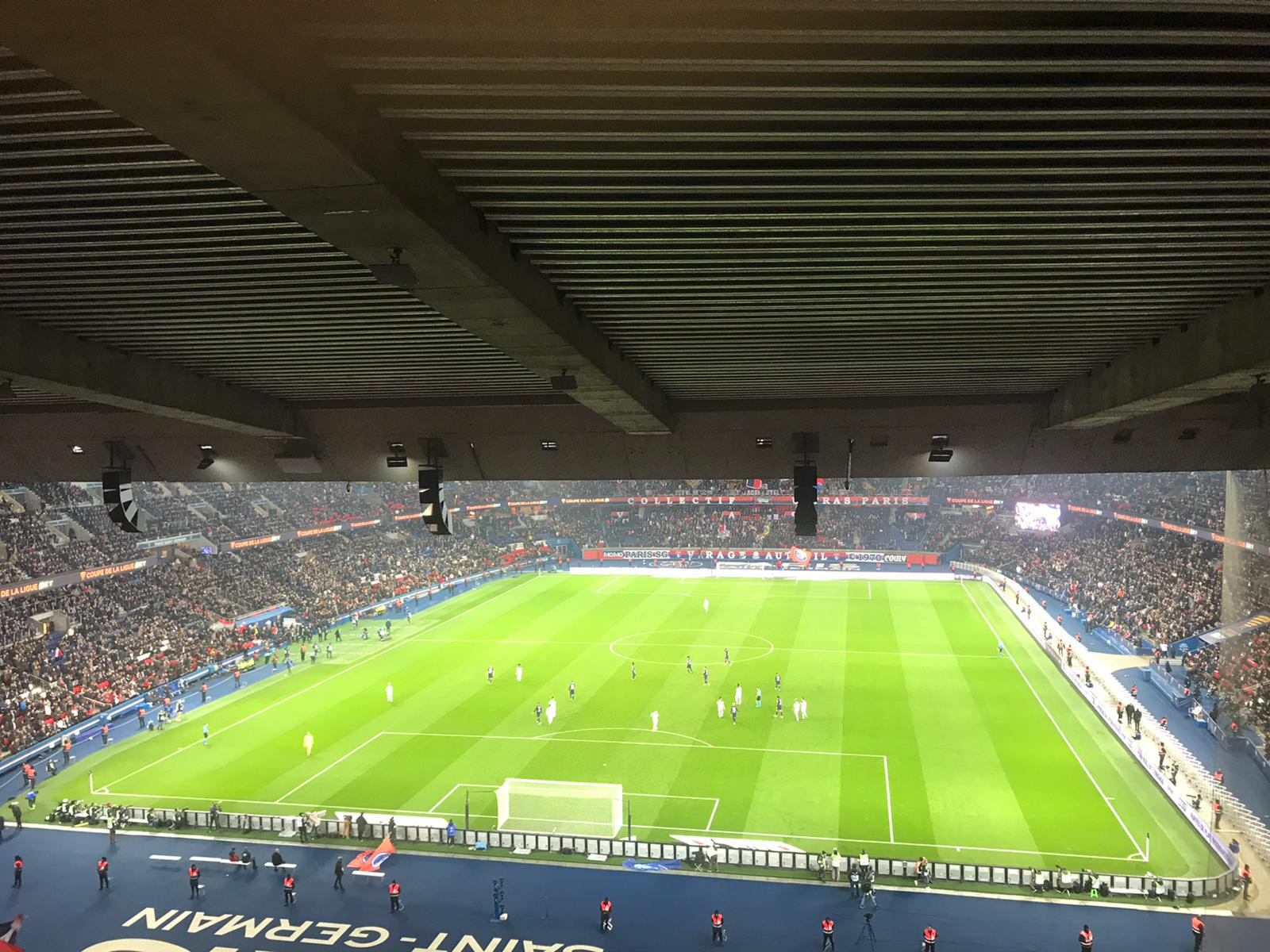 PSG-AS Saint-Etienne CDL